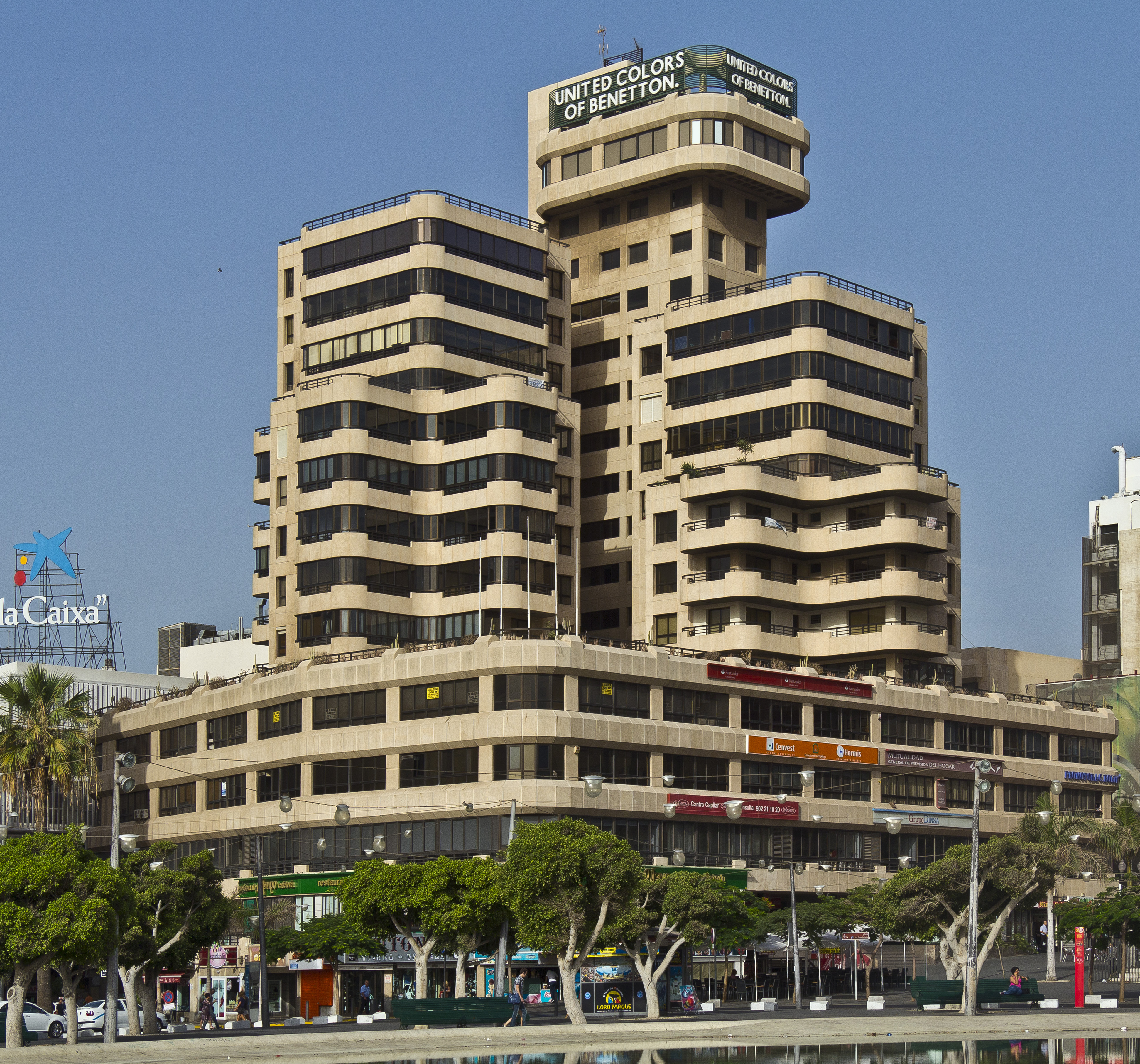 Das Edificio Olympo befindet sich an der Ecke der Plaza De España und der Plaza Candelaria in Santa Cruz de Tenerife. Das Gebäude ist 57 Meter hoch. Es wurde im Jahr 1975 fertiggestellt. Der Architekt war José Miguel Molowny Barreto.